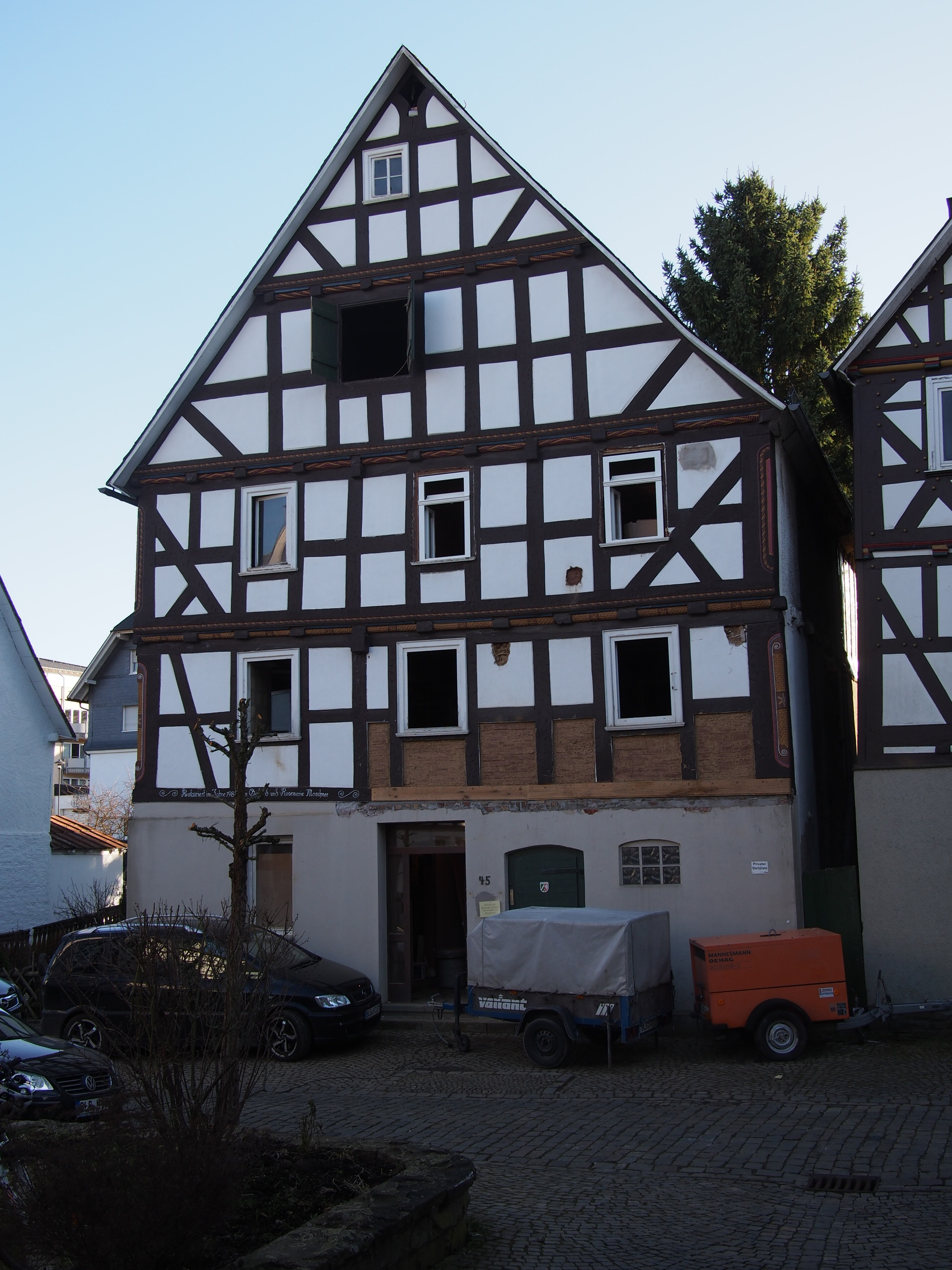 Nordfassade des Hauses Wallstraße 45 in Bad Laasphe, erbaut 1694 (d)